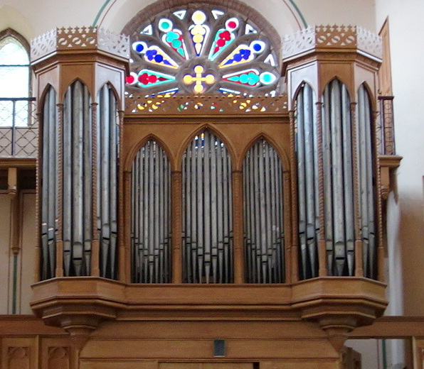 Orgel der Nikolaikirche, Oderberg, Brandenburg, Deutschland